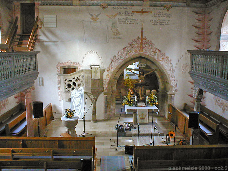 Evangelische Lambertuskirche in Pfaffenhofen (Württ.), Blick von der Empore zum Turmchor